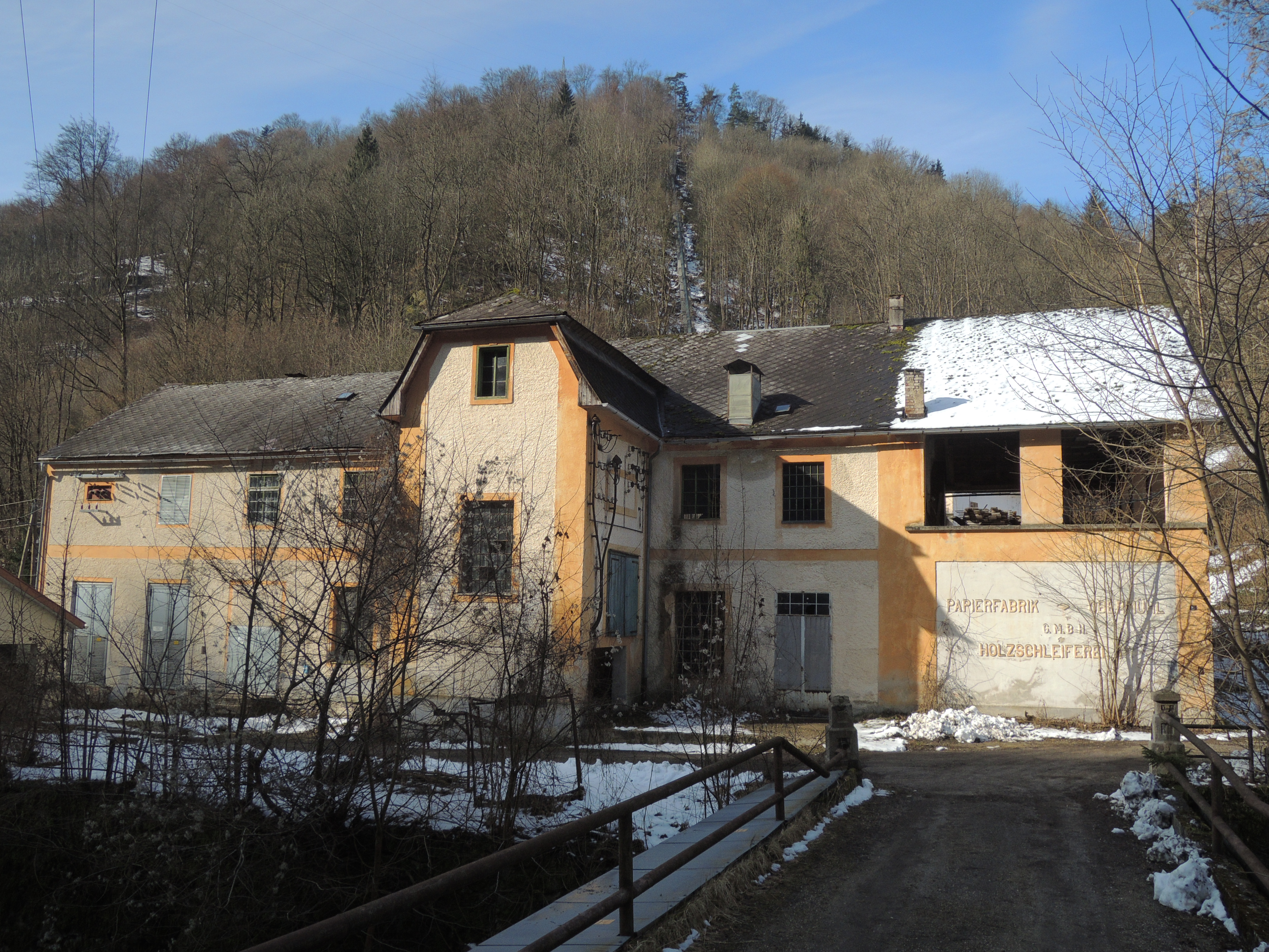 Die sogenannte A-Schleiferei der Papierfabrik Obermühl